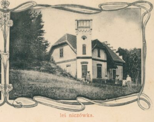 Нижнів